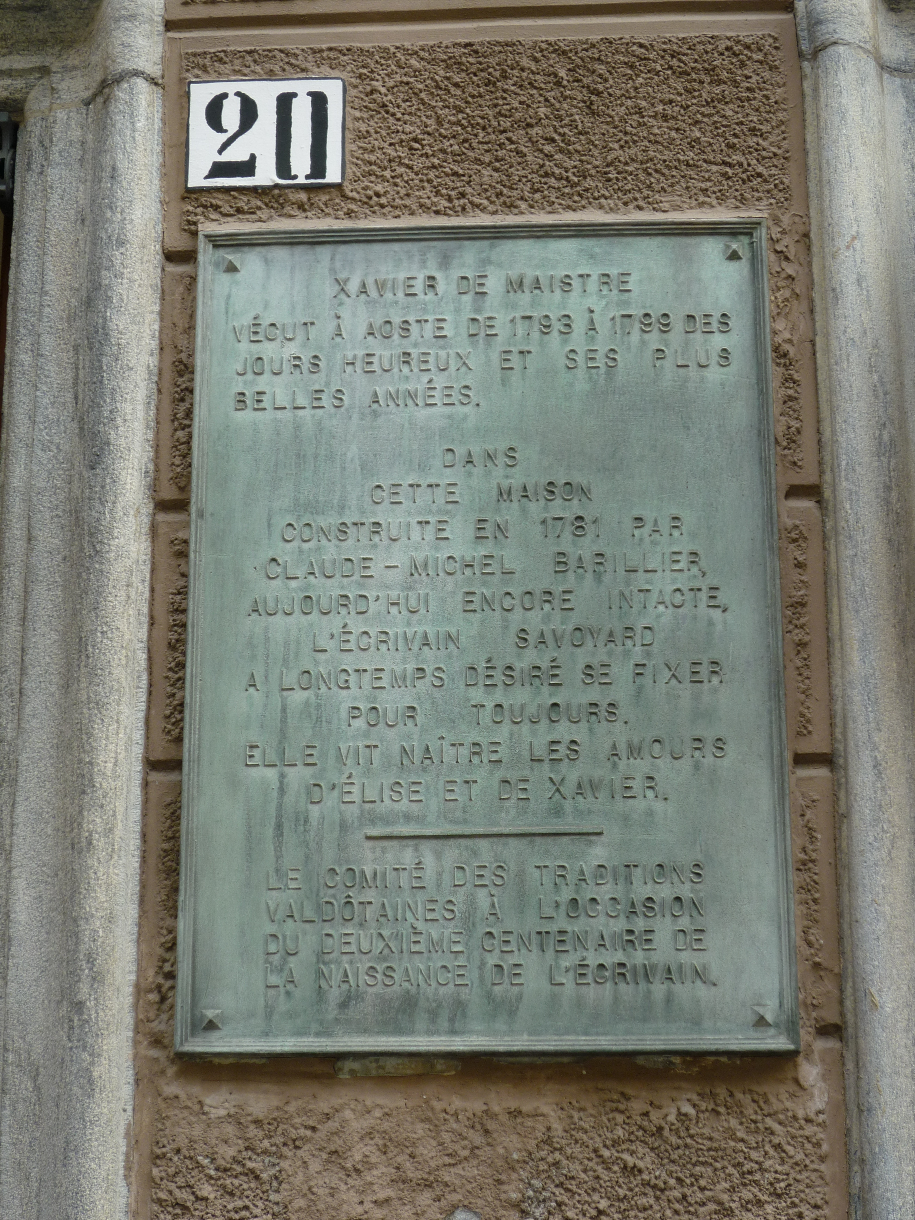 Plaque dédiée à Xavier de Maistre à Aoste (Rue Croix de Ville - Maison Barratier)